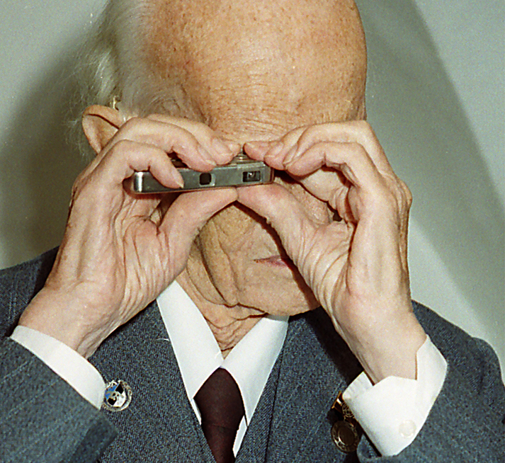 Walter Zapp